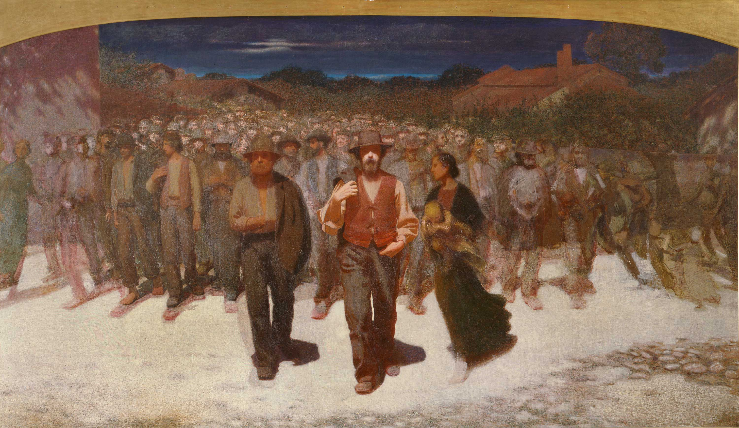 Study for Il Quarto Stato